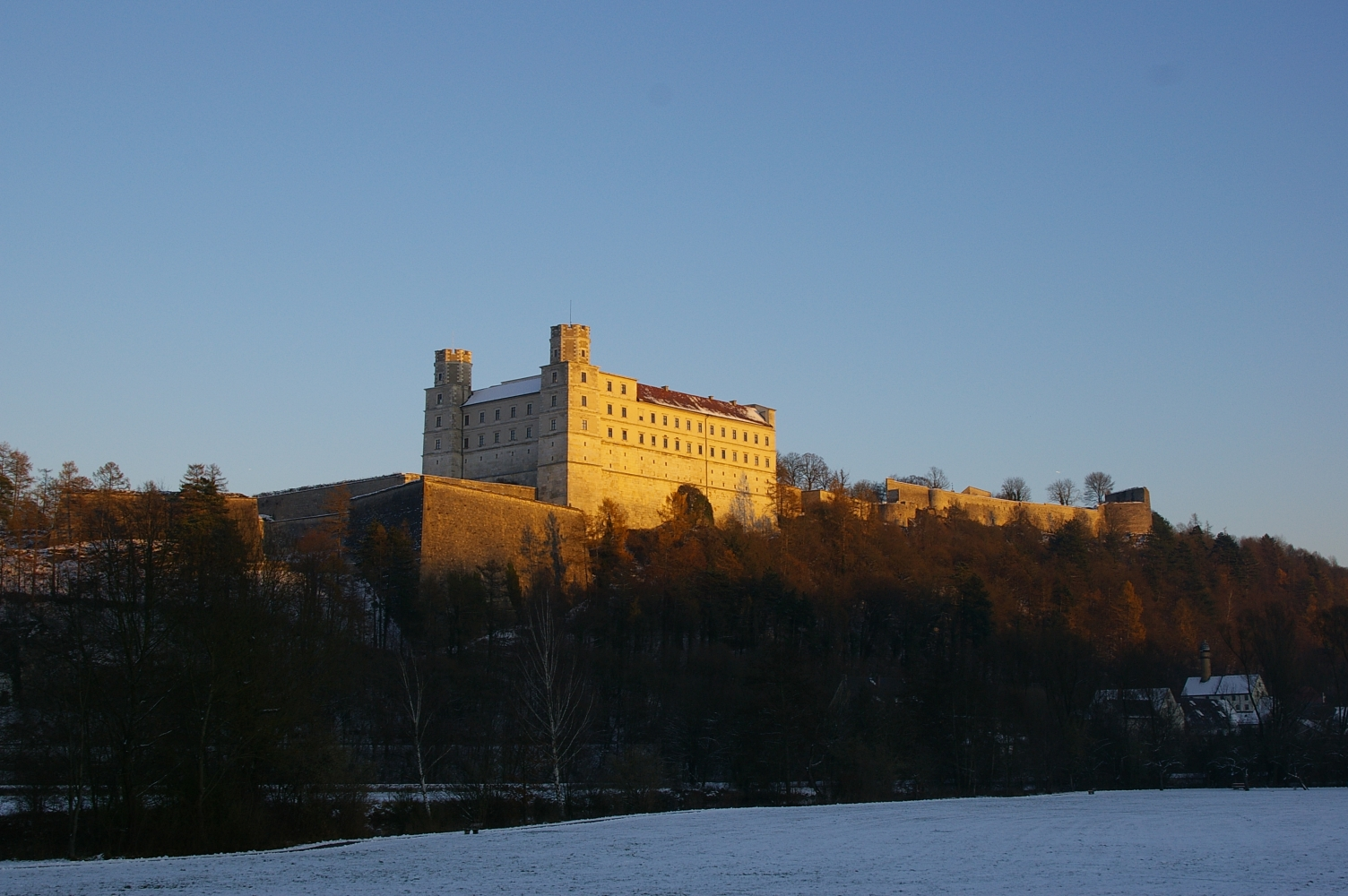 Die Burg zu Eichstätt im Altmühltal im November 2005.